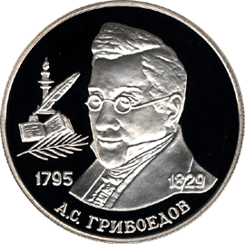 Монета Банка России — Серия: «Выдающиеся личности России», 200-летие со дня рождения А.С. Грибоедова, 2 рубля, реверс.